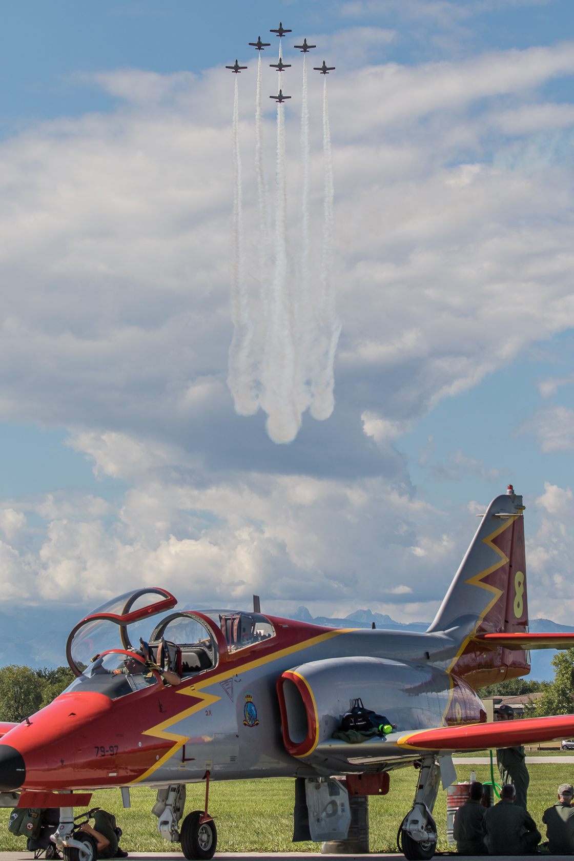 Patrulla Águila on CASA C-101EB Aviojet display